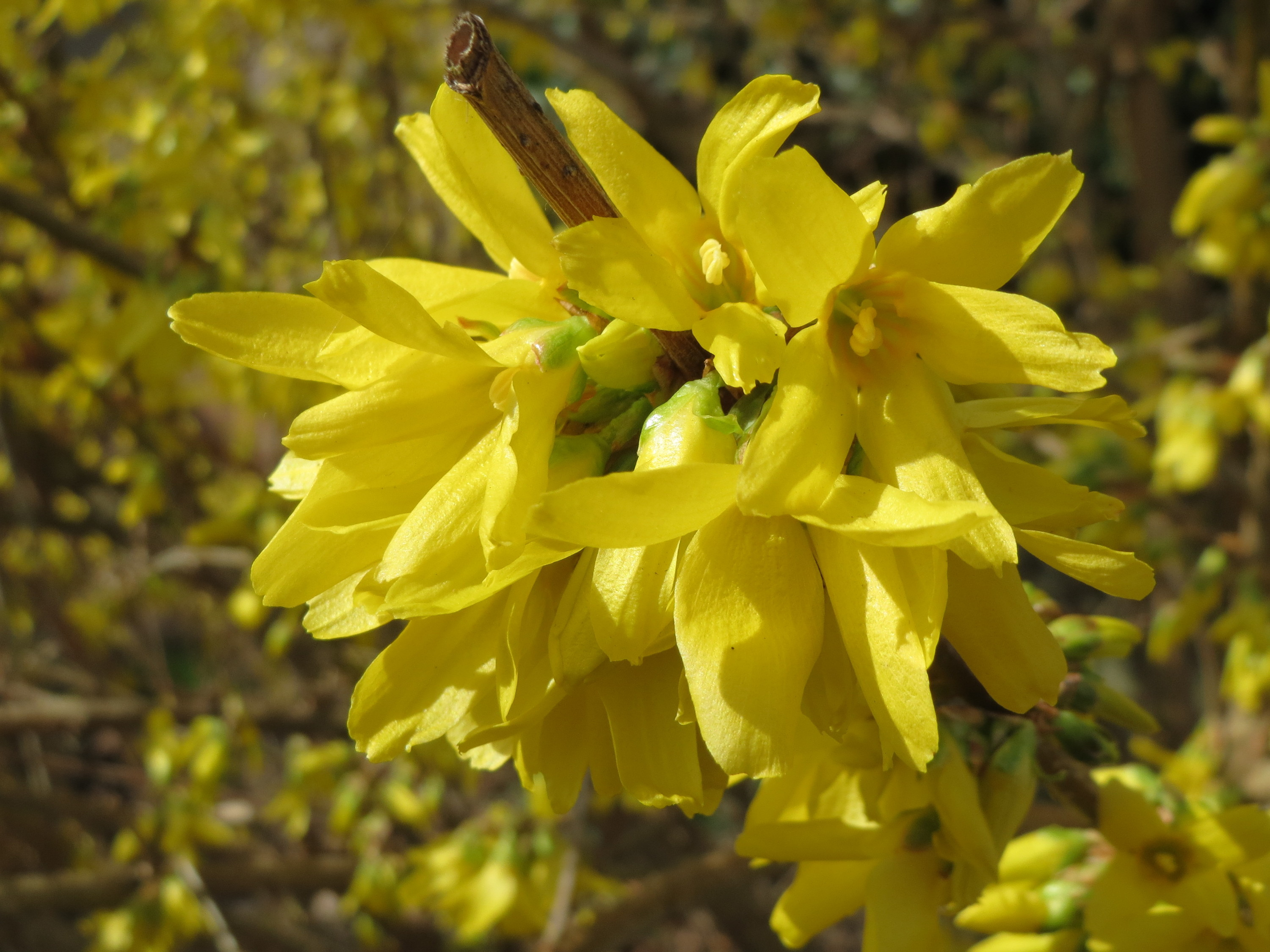 Forsythie (Forsythia × intermedia) in Saarbrücken